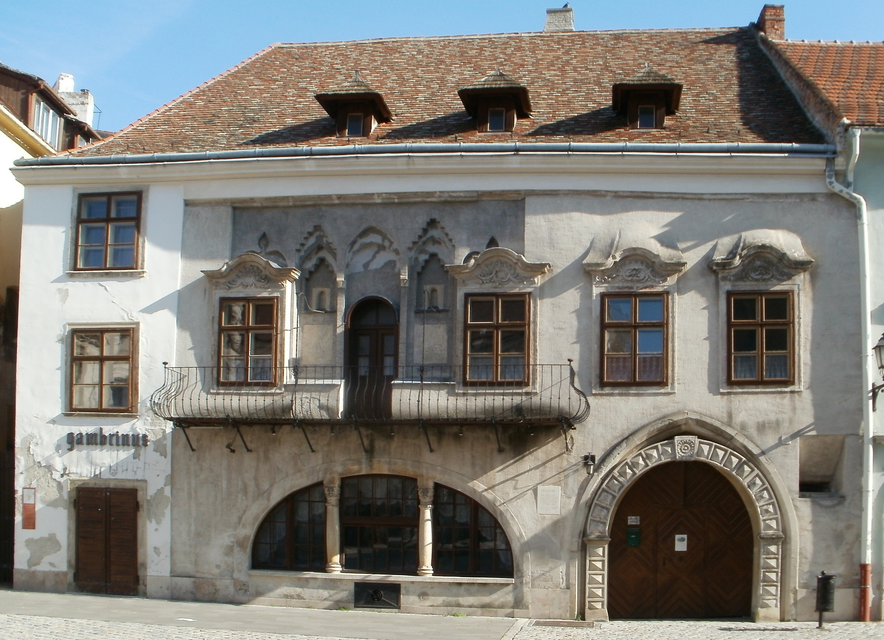 A 15. század elején épült házat 1422-ben Zsigmond király adományozta Sopronnak városháza céljára, ez is maradt egészen 1496-ig. A 17. század elején átalakították. A ház történetéhez tatozik, hogy itt írta le Gugelweit János városi jegyző a 15. században az úgynevezett Soproni virágéneket, amelynek kéziratát ma a városi levéltár őrzi. A bejárat 1620-ból való keretezését gyémántmetszéssel díszítették. Körülötte csúcsíves kapu maradványa látszik. Korábban a Gambrinus étterem működött itt, ami a felvétel időpontja előtt 6-7 évvel megszűnt (Dr. Czellár Katalin Sopron című könyvéből) . This is a photo of a monument in Hungary, Identifier: 4782